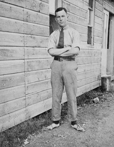 "Title / Titre :Lester B. Pearson serving with the Canadian Army Medical Corps / Lester B. Pearson, à l'époque où il faisait partie du service de santé de l'Armée canadienne Creator(s) / Créateur(s) : Unknown / Inconnu Date(s) : 1916 Reference No. / Numéro de référence : 3192030 Location / Lieu : Salonika Base, Greece / Base de Salonique, Grèce Credit / Mention de source : Library and Archives Canada / PA-117622 / Bibliothèque et Archives Canada / PA-117622"